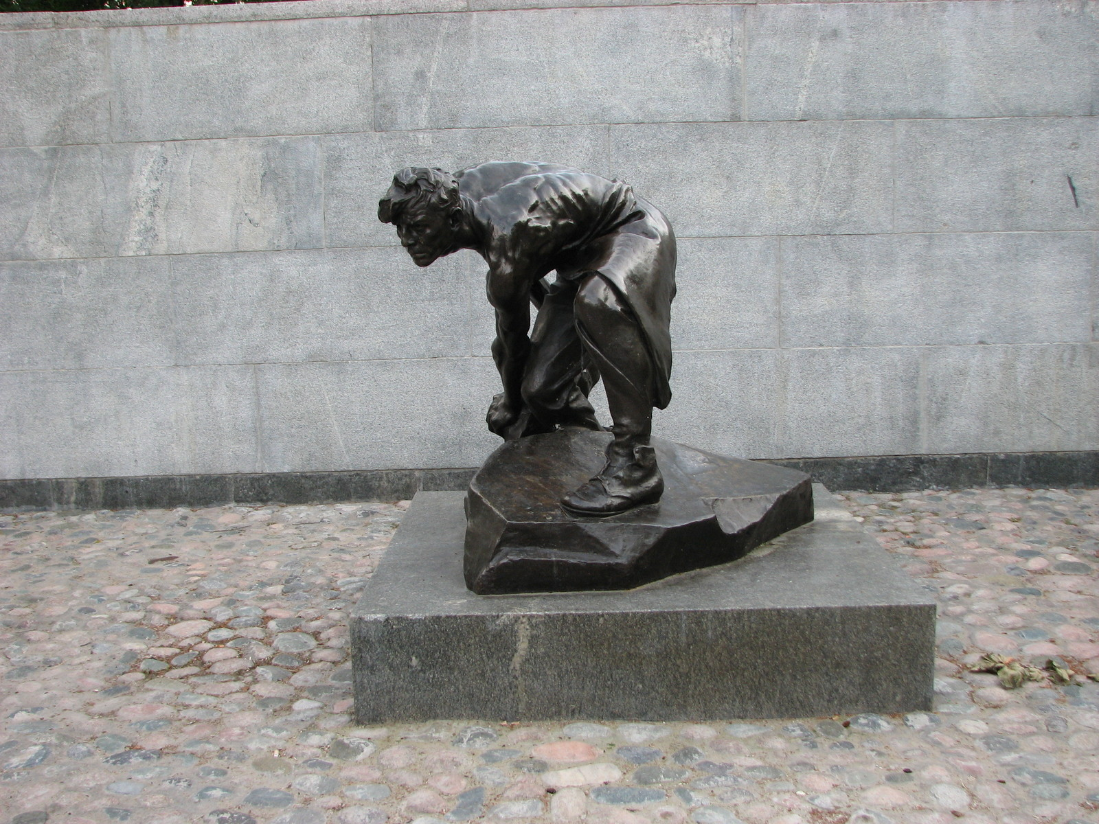 Памятник Булыжник - оружие пролетариата: 1905 года ул., Пресненский, Центральный округ, Москва